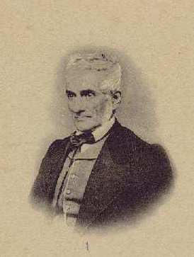 Matías Laviña: arquitectos restauradores de la Catedral de León